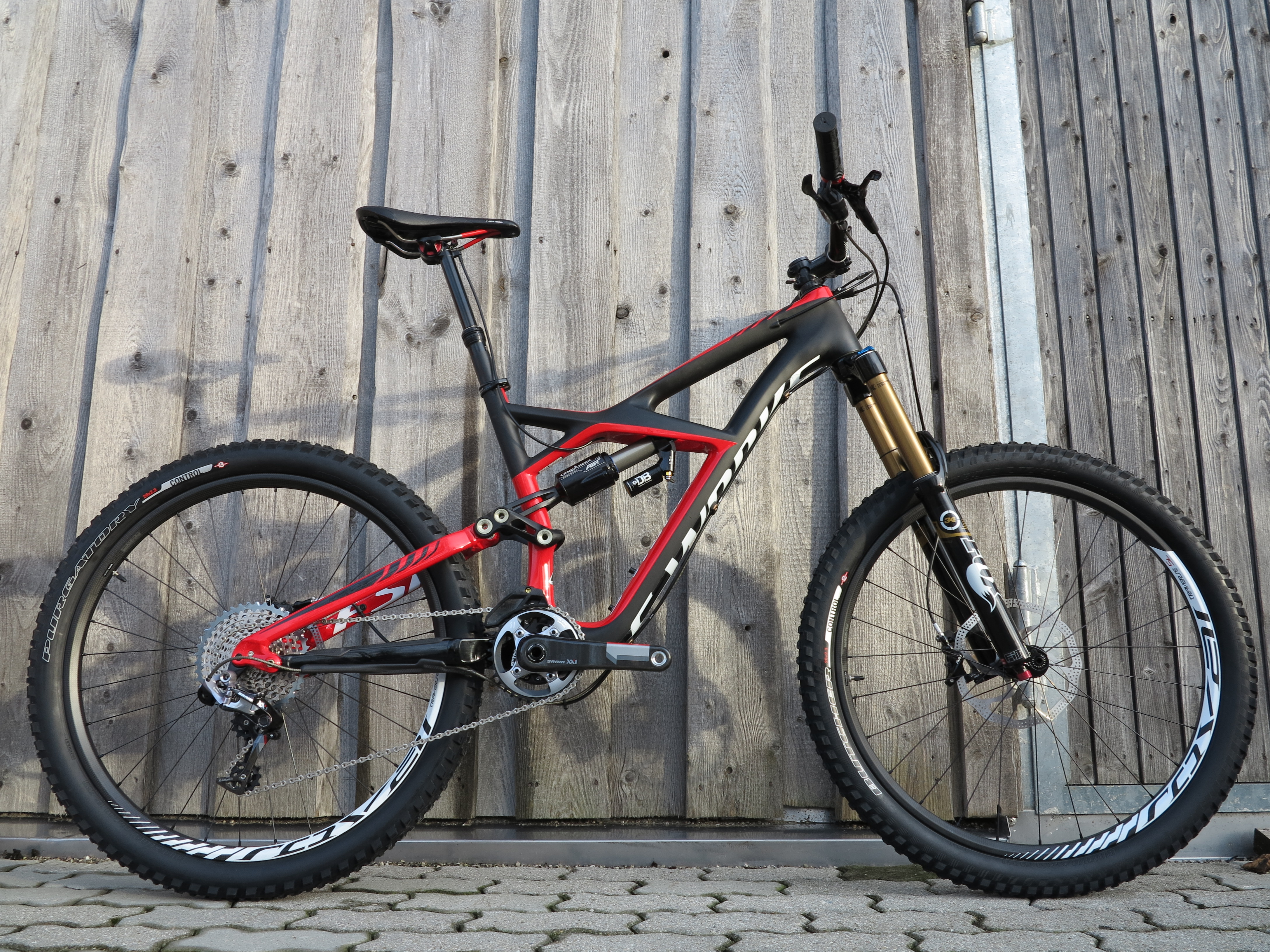 Das Enduro ist ein Mountainbike aus dem All-Mountain Segment mit 165mm Federweg, Steckachsennaben, Kettenführung und Command Post Blacklite-Sattelstütze.